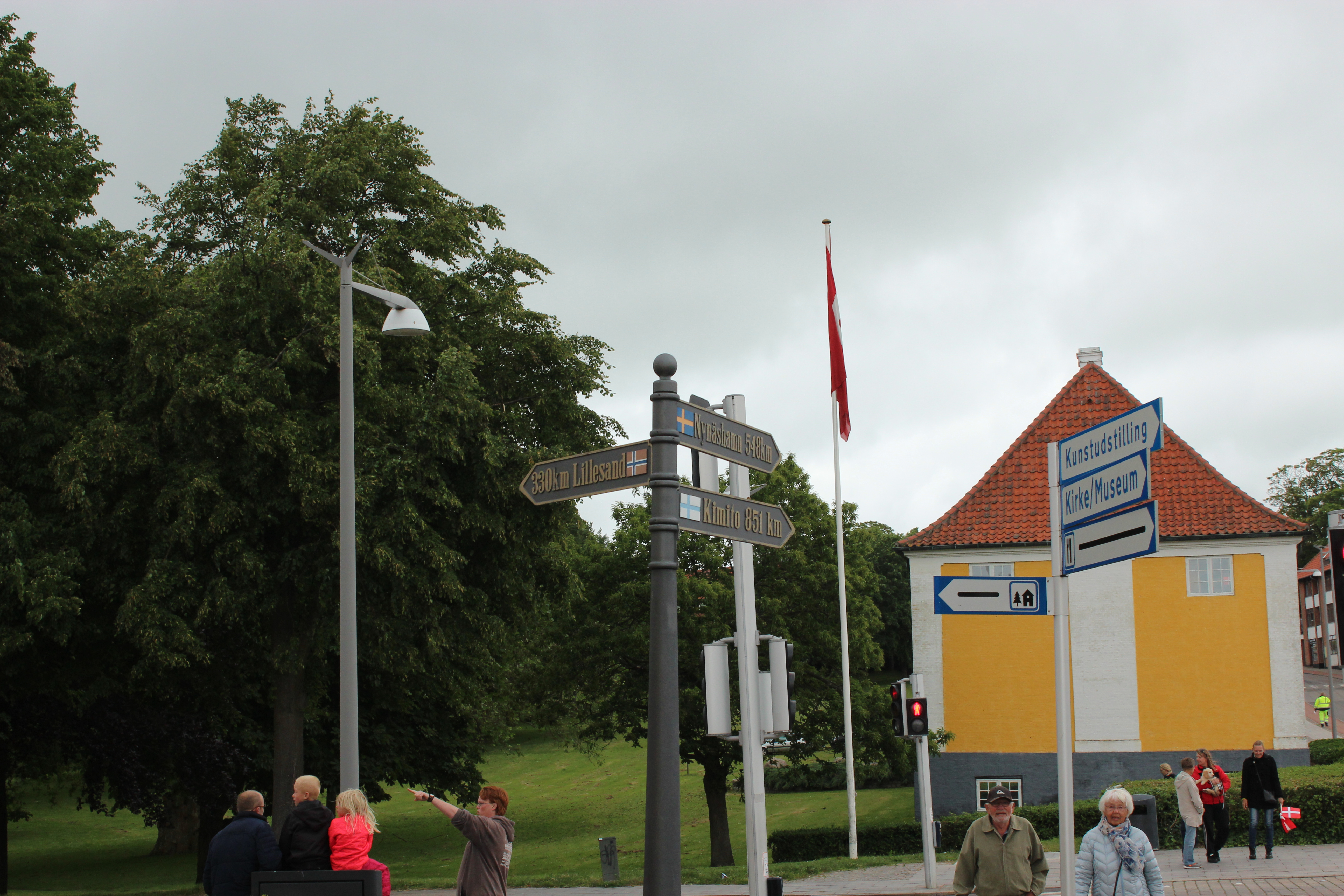 Skilt med afstand til venskabsbyer i Kalundborg